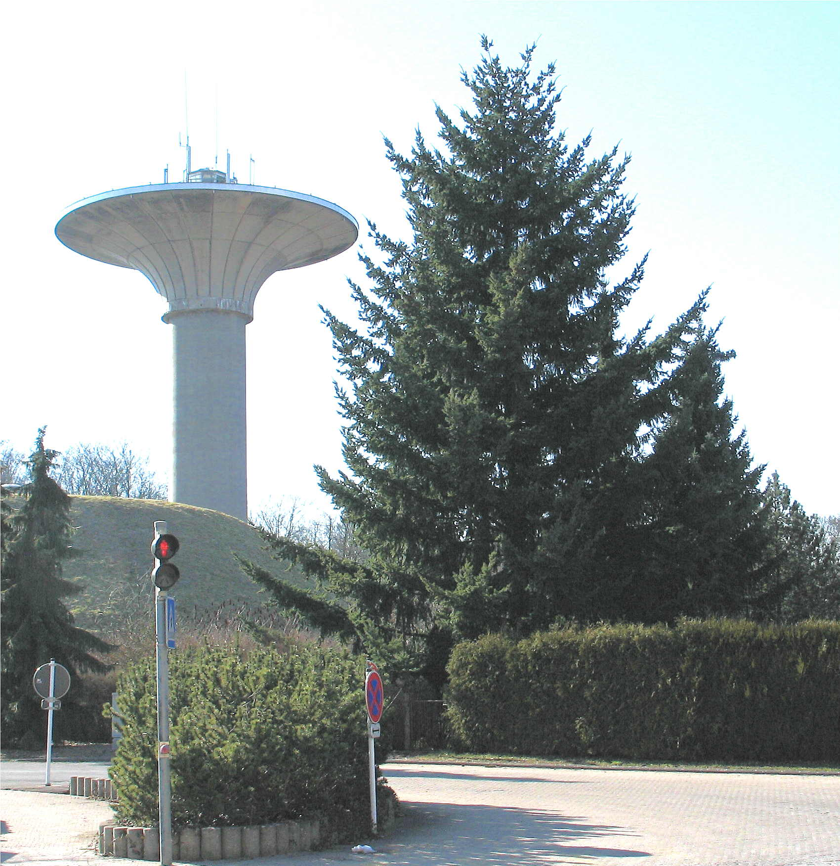 De Waassertuerm a virdrun de Waasserbaseng um Sennengerbierg